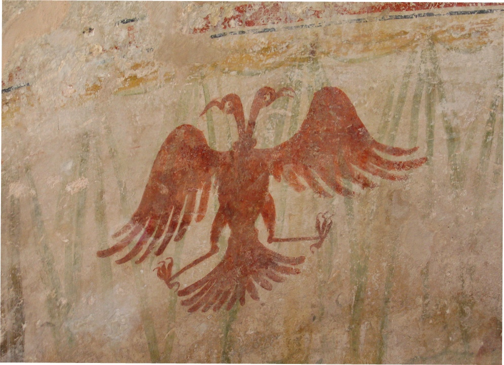 Darstellung eines Doppeladlers in der St. Antonius-Kirche am Kap Rodon